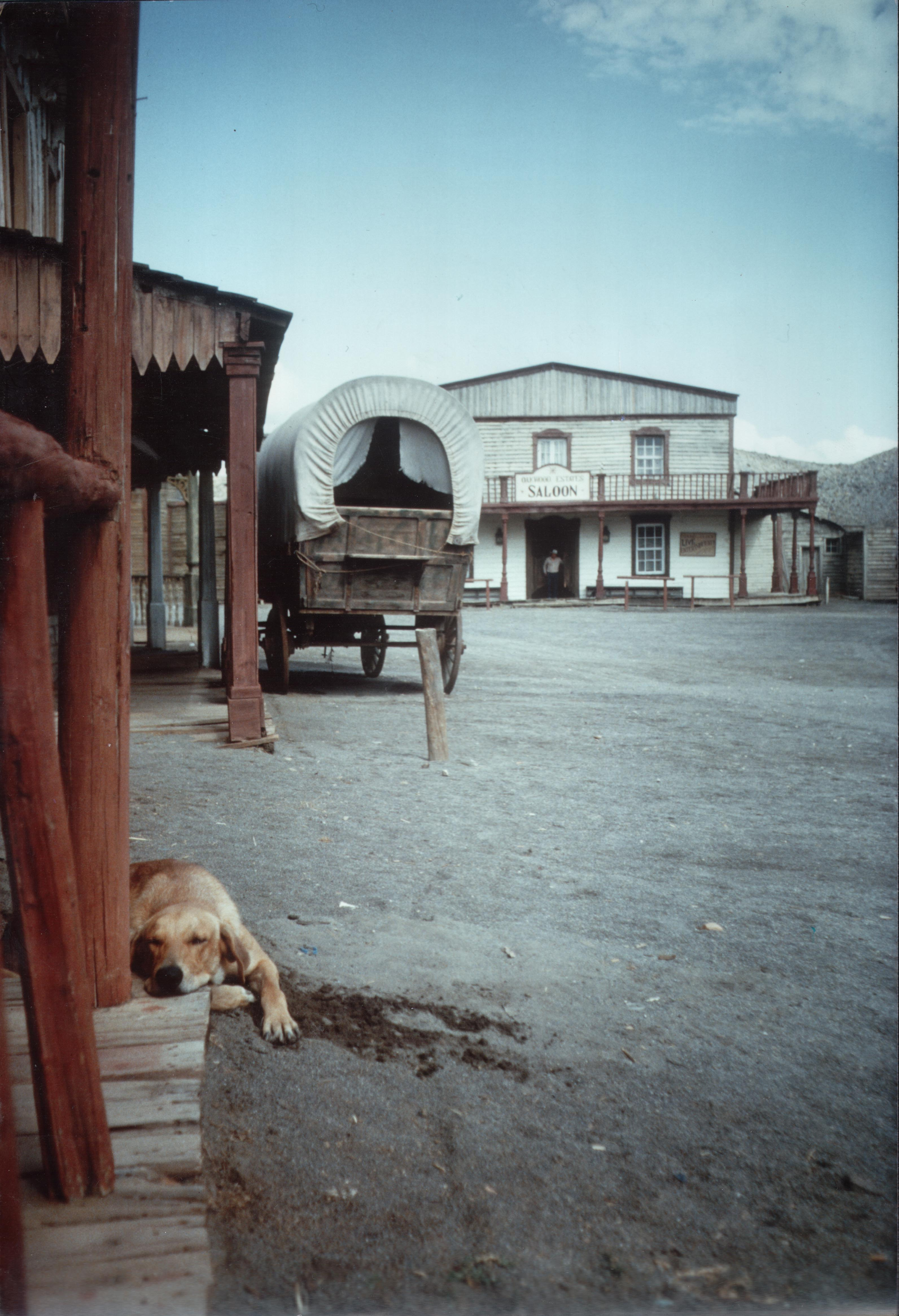 Westerndorf "Yucca City" bei Tabernas (Almeria) Spanien Datum: 15. September 1984 Quelle: selbst erstelltes Foto Urheber: Michael Pfeiffer